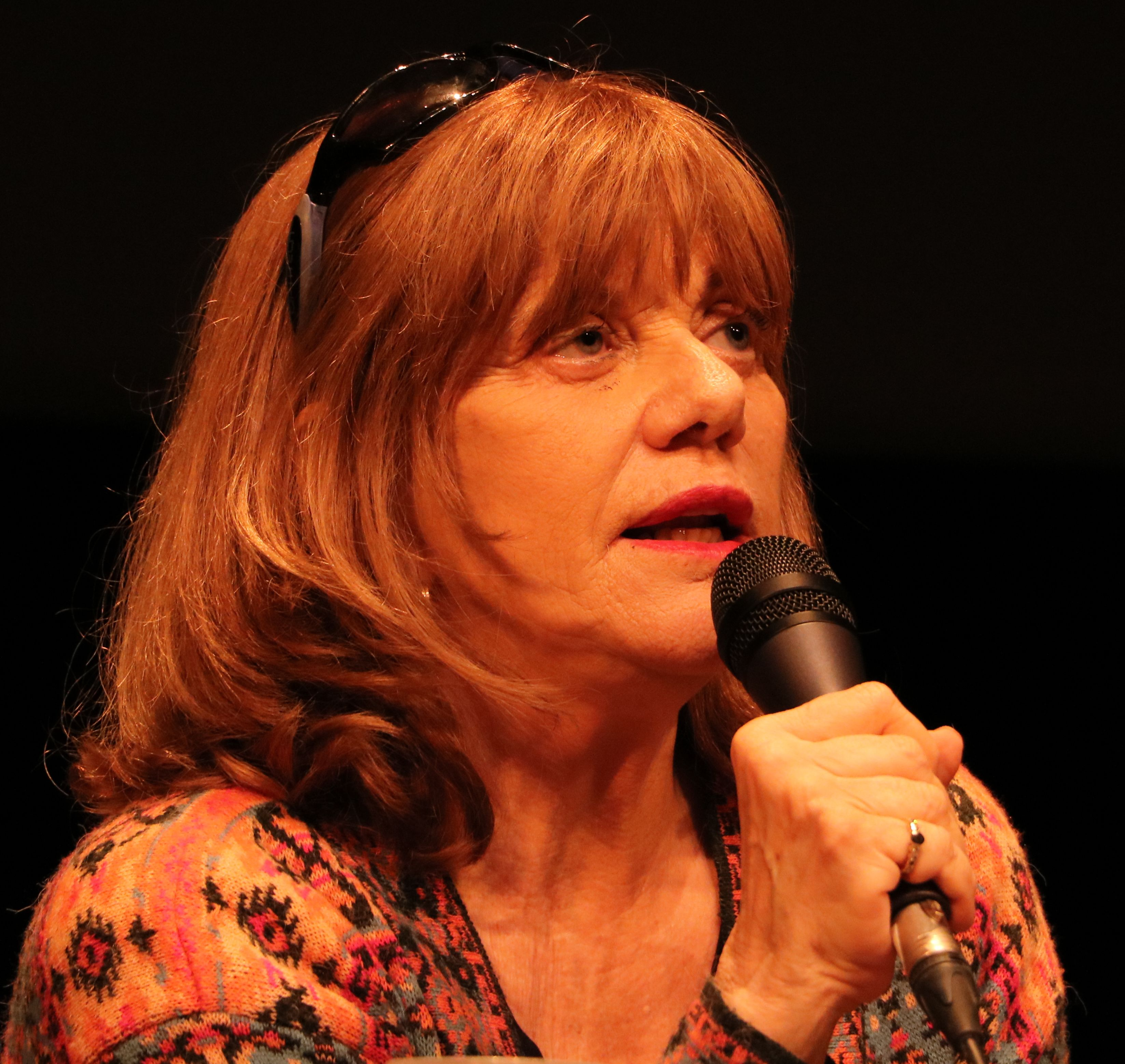 Elsa Osorio, le 10 novembre 2018, Grand T, Nantes